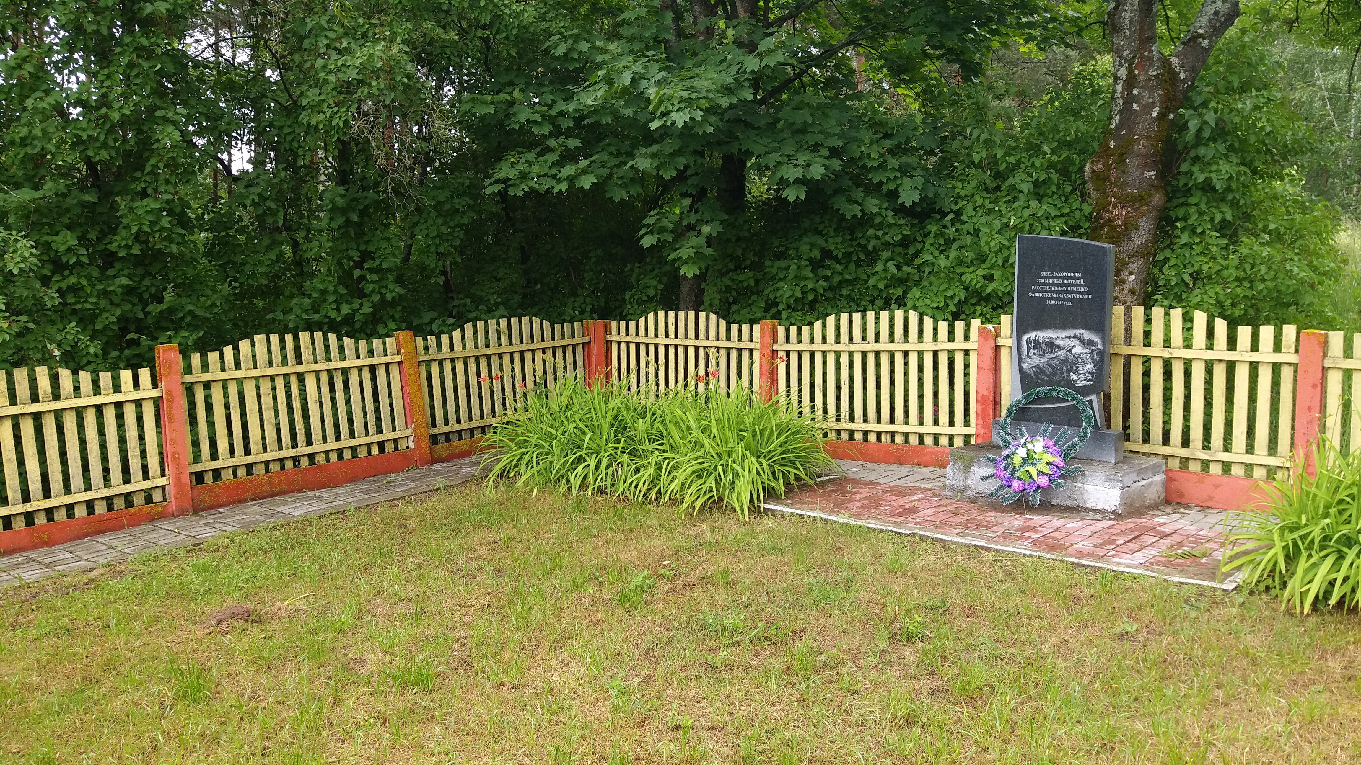 Памятник 2700 убитым нацистами евреям посёлка Холопеничи Крупского района 20 сентября 1941 года. Сама братская могила с останками убитых находится слева от памятника в низине. Первоначальный памятник из бетона был установлен на этом месте в 1957 году. Государственное воинское захоронение – номер знака 5372.